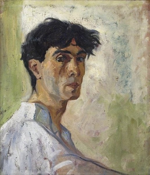 Shalva Kikodze. Self-portrait, oil on canvas, 65X44, 1920